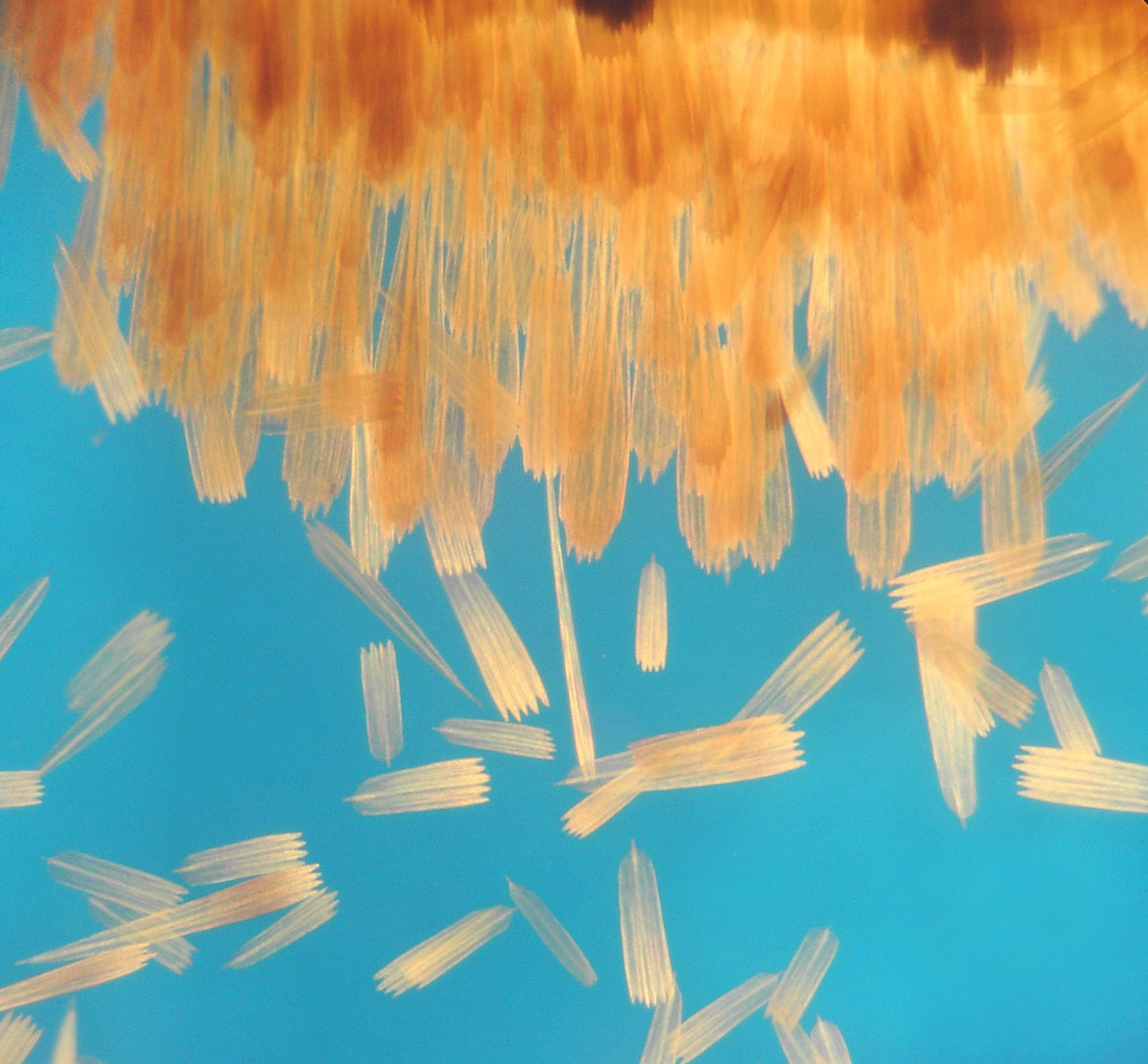 Rand eines Mottenflügels bei ca. 200 fach mit Polfilter. Ausschnitt ca: 600µm x 600µm